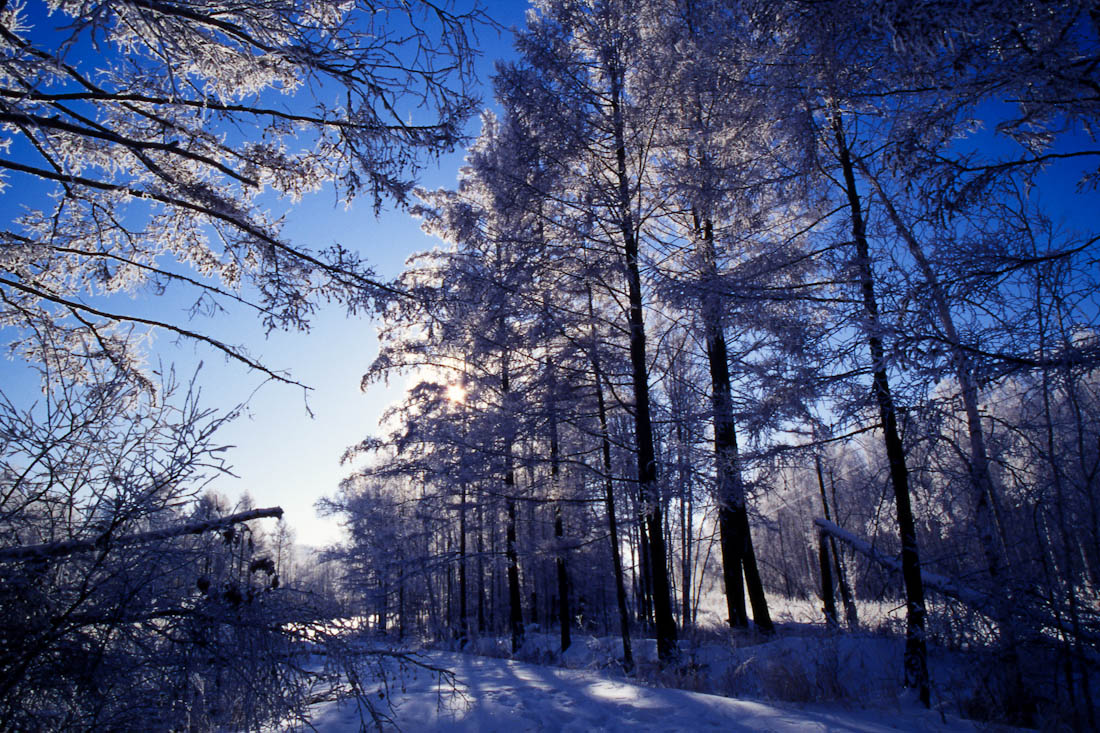 大兴安岭林海雪原的清晨，阳光照进静静的林海。